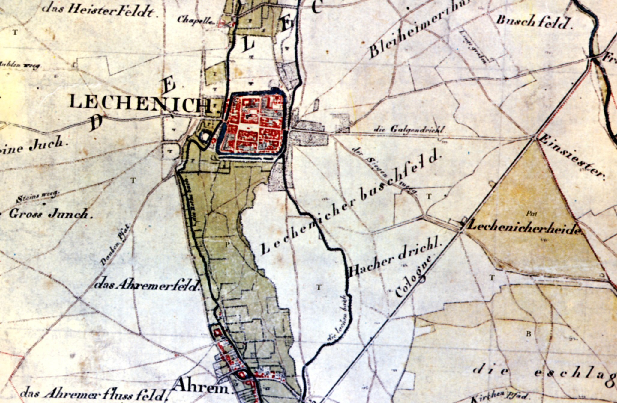 Kartenaufnahme der Rheinlande, Jean Joseph Tranchot und von Müffling 1803-1820. Kartenausschnitt Lechenich